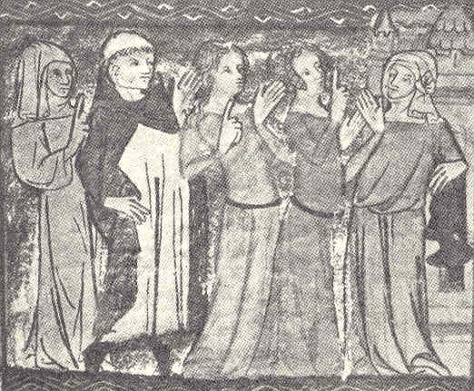 En dominikan i samspråk med några kvinnor, kan illustrera Petrus de Dacias relation med de fromma kvinnor som han startar S:ta Ingrids kloster i Skänninge med.